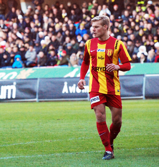 Johan Arneng